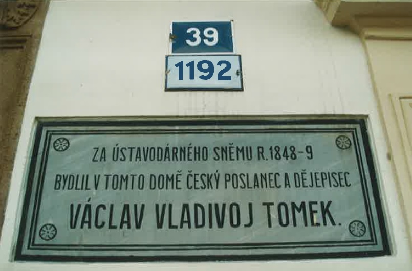 Pamětní deska na vstupu do Květné zahrady v Kroměříži označující místo ubytování Václava Vladivoje Tomka v době konání Kroměřížského sněmu